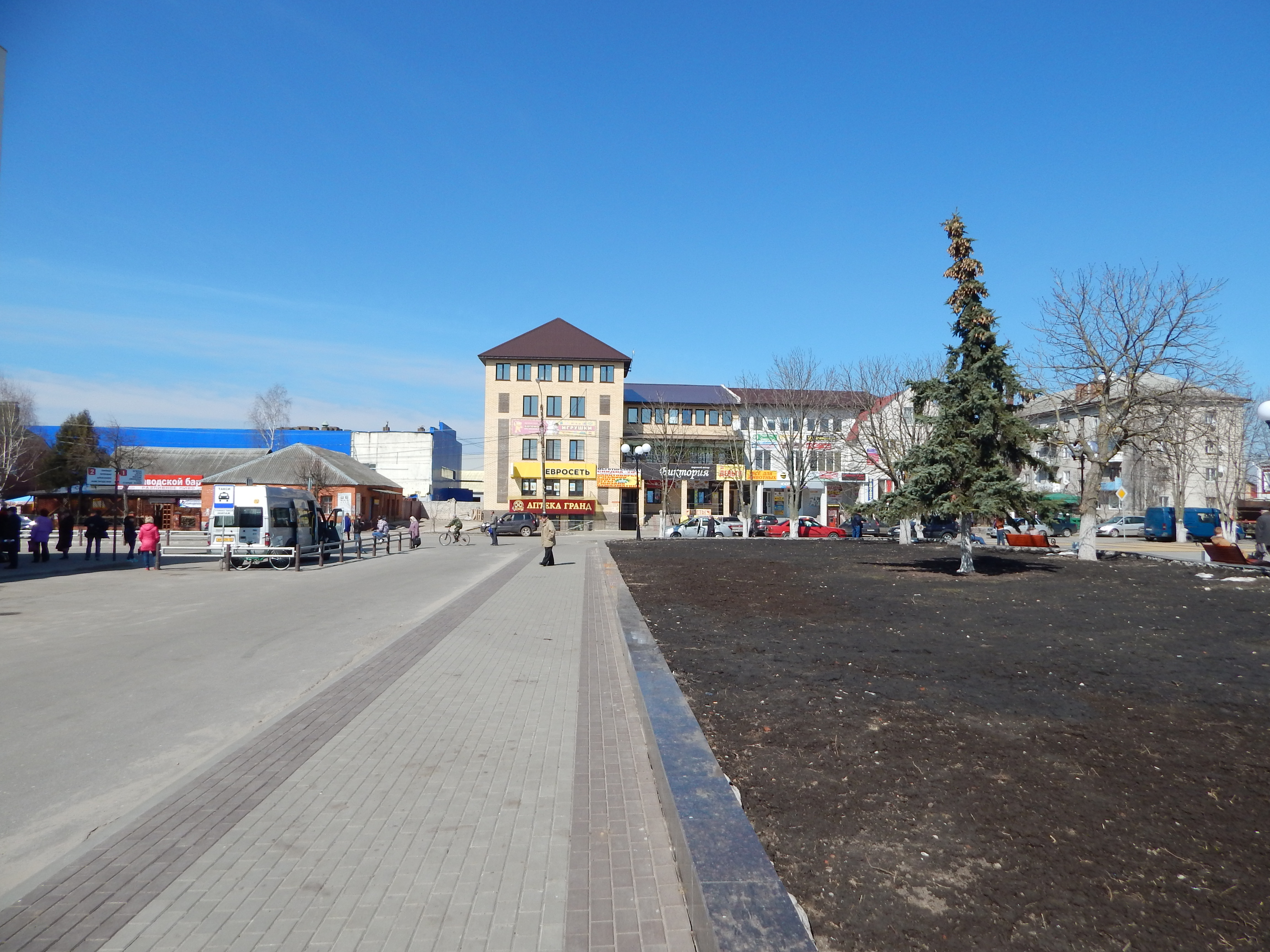 Karachev, Bryansk Oblast, Russia